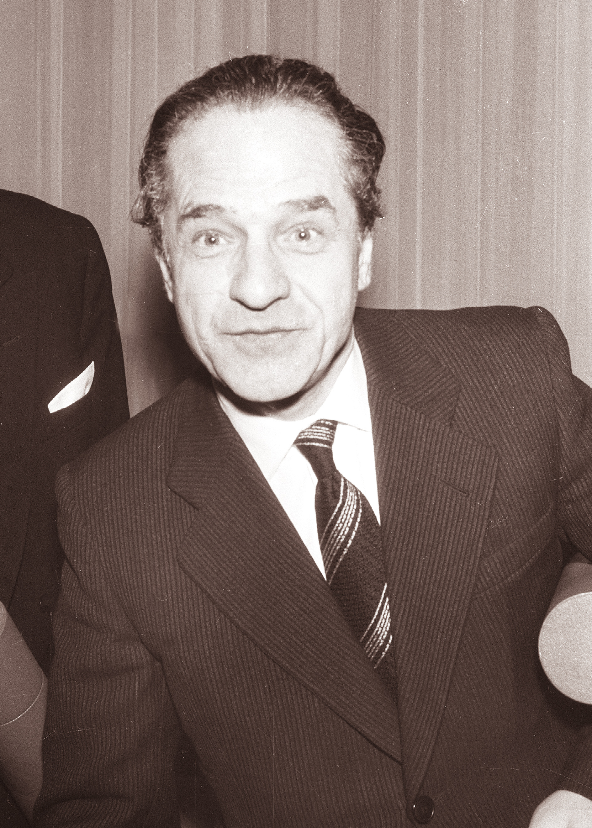 Dragotin Cvetko